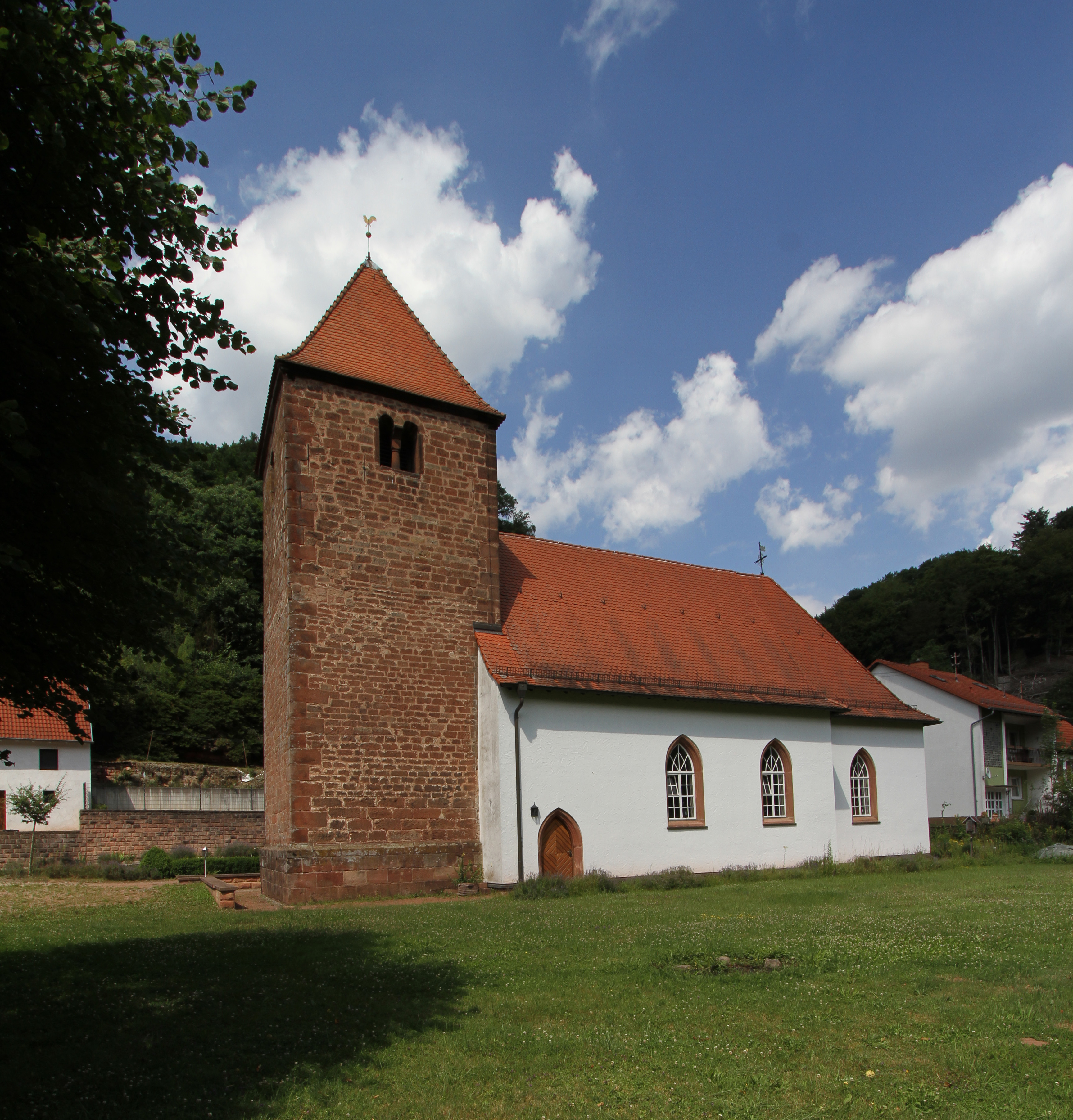 Evangelische Kirche in Winterbach/Pfalz